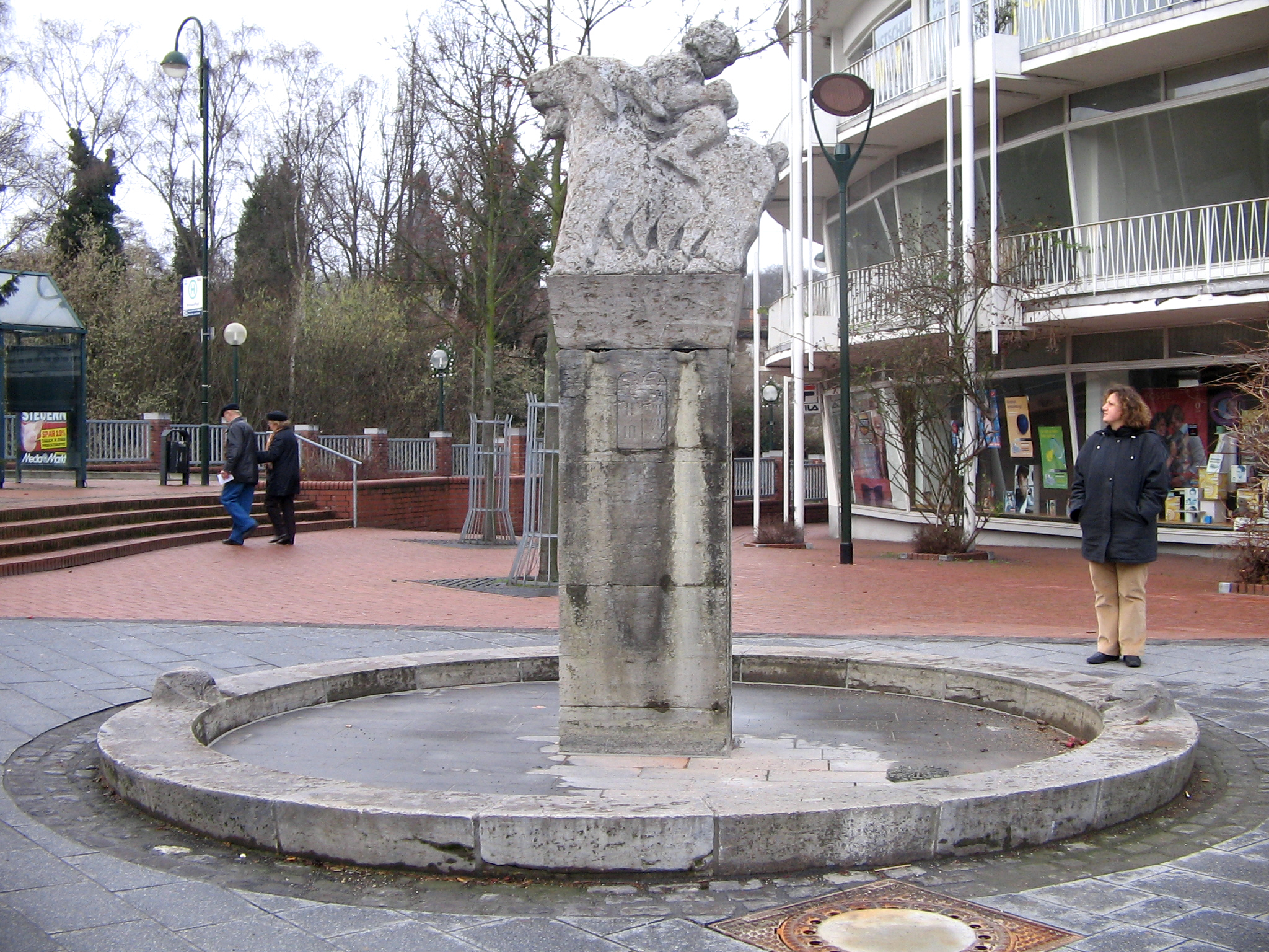 "Bockreiter" am Ferdinand-Schmetz-Platz in Herzogenrath